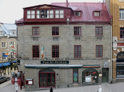 1200, rue Saint-Jean, Québec, Canada, Pub St-Patrick dans l'ancienne maison des photographes Livernois